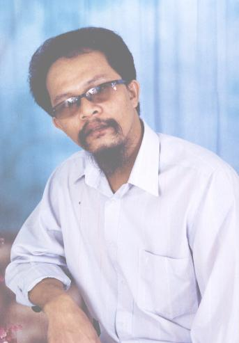 Cebuano: Kaugalingong hulagway ni Edgar S. Godin, gipagawas ubos sa GFDL. Ang elektronikong kopya sa paghatag anaa sa mga kamot ni Bentong Isles.